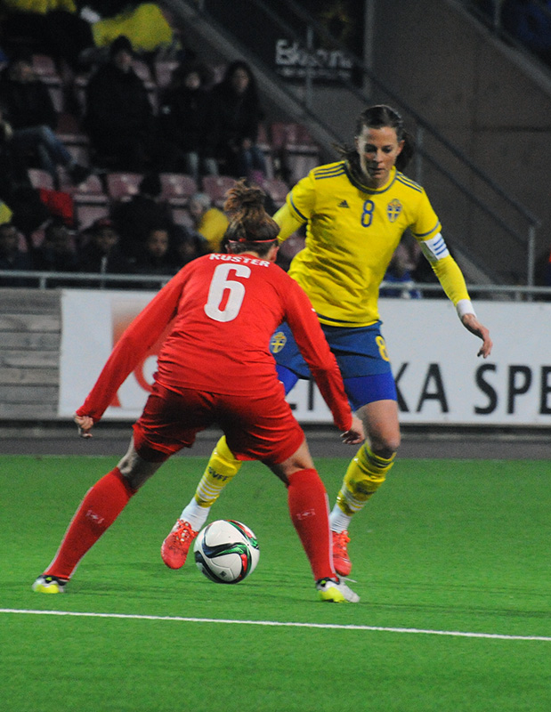 a_72_0941